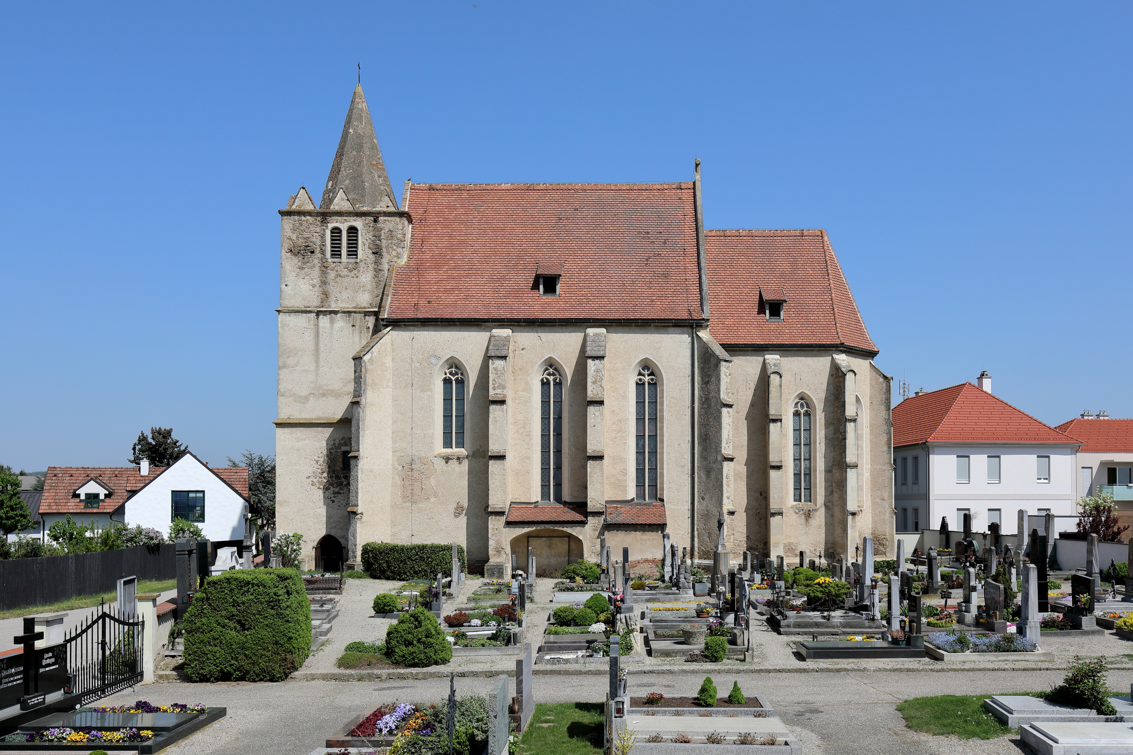 Südansicht der röm.-kath.Pfarrkirche hl. Sebastian in Engabrunn, ein Ortsteil der niederösterreichischen Markgemeinde Grafenegg. Die spätgotische Saalkirche wurde von 1501 bis 1513 in erhöhter Lage errichtet und 1522 geweiht.